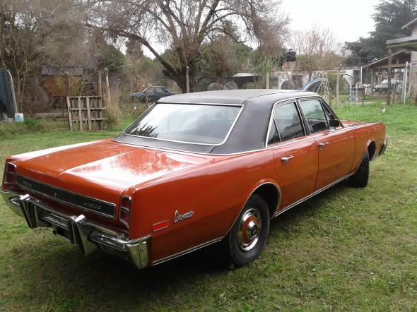 automatic